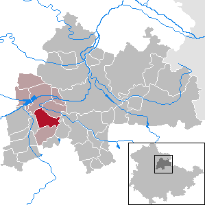 Haßleben in Thuringia - District Sömmerda